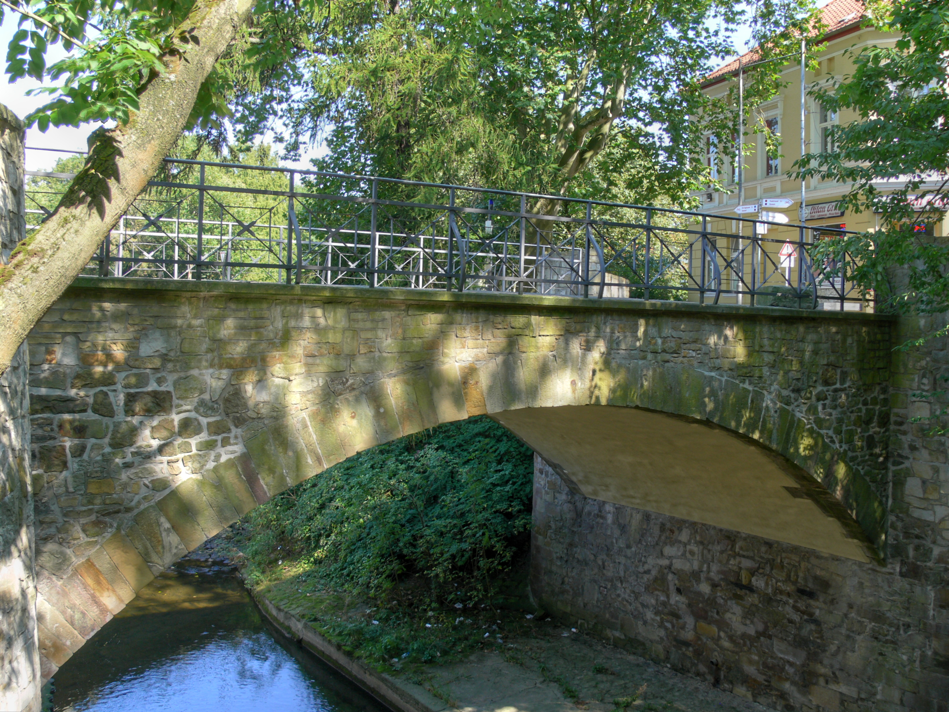 Steintorbrücke in Herford, Steinstraße, technisches Denkmal (HDR)